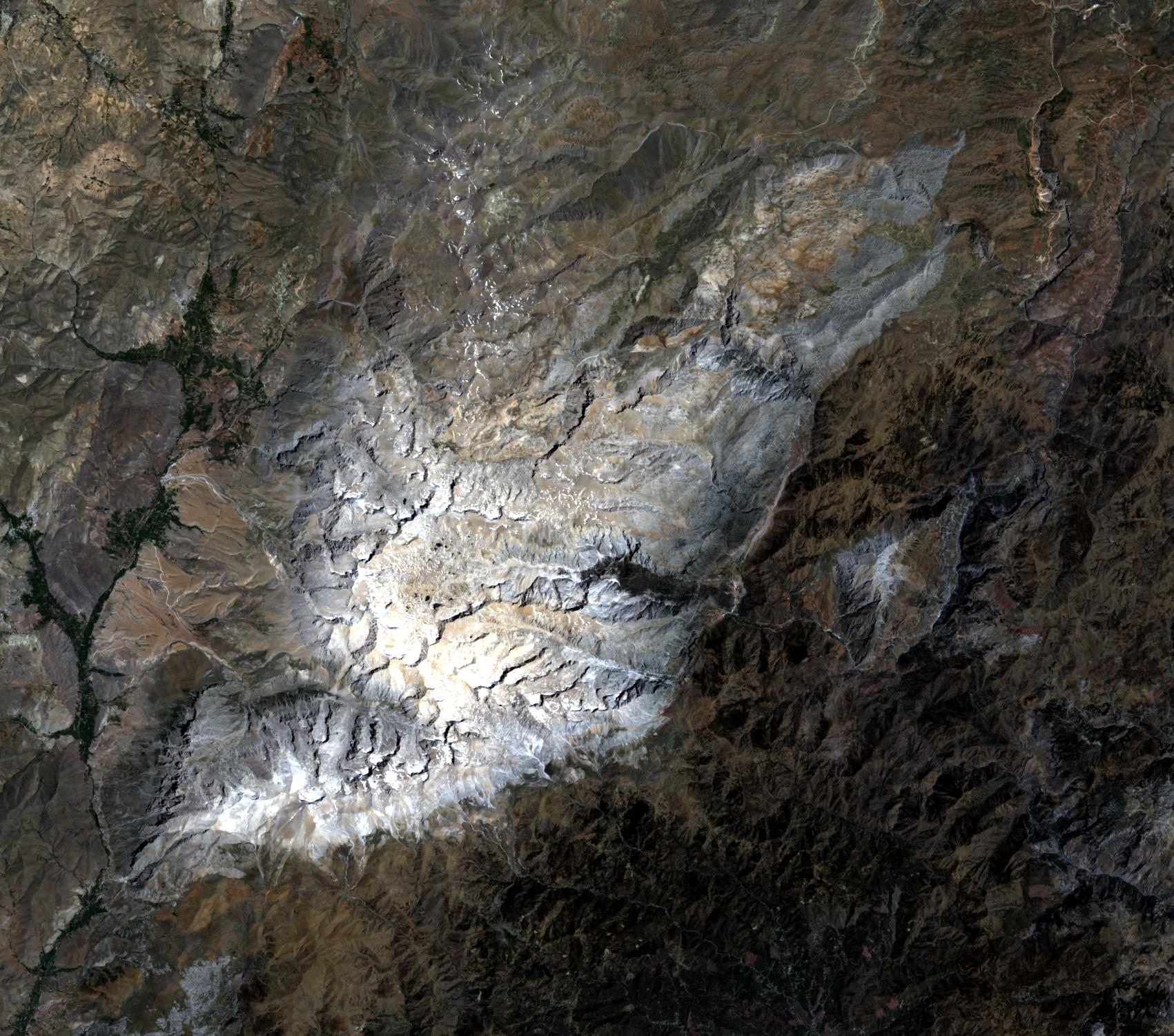 Landsat-Echfarbcomposition (Kanäle 1, 2 und 3) des Aladaglar (06.07.2010)